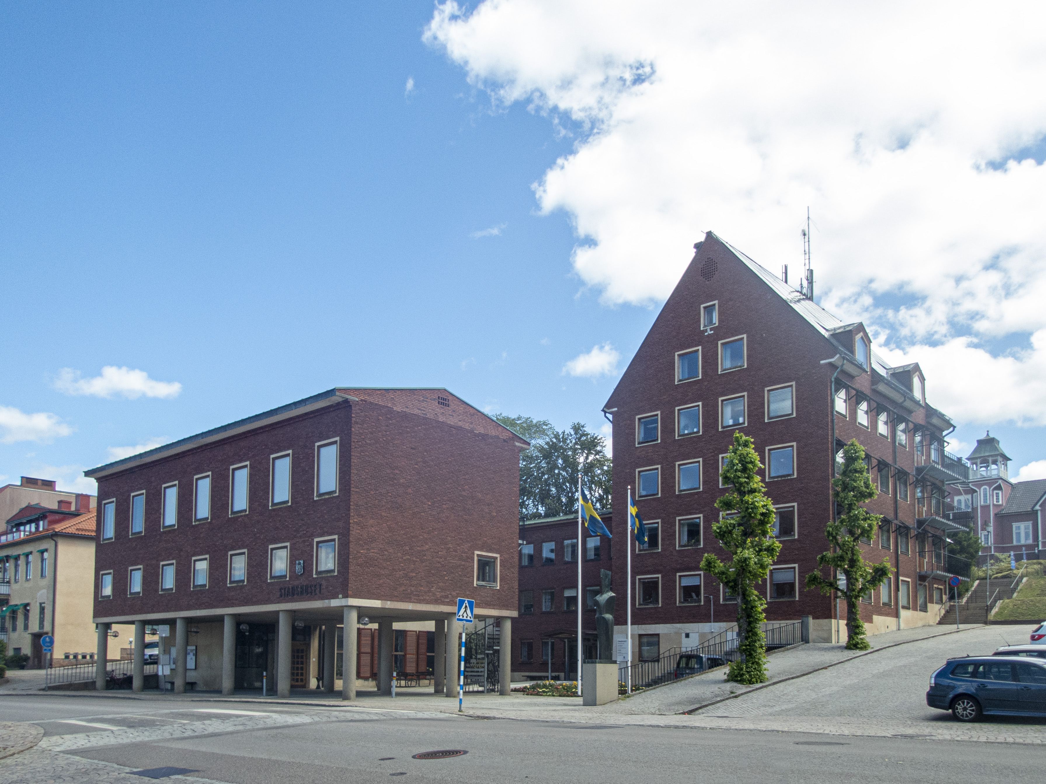 Ulricehamns stadshus. Byggnadsår 1957. Folke Sundberg (Inredningsarkitekt) Sten Gumaelius (Arkitekt) Viking Göransson (Arkitekt)